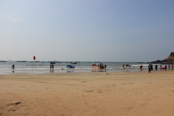 பாகா கடற்கரை